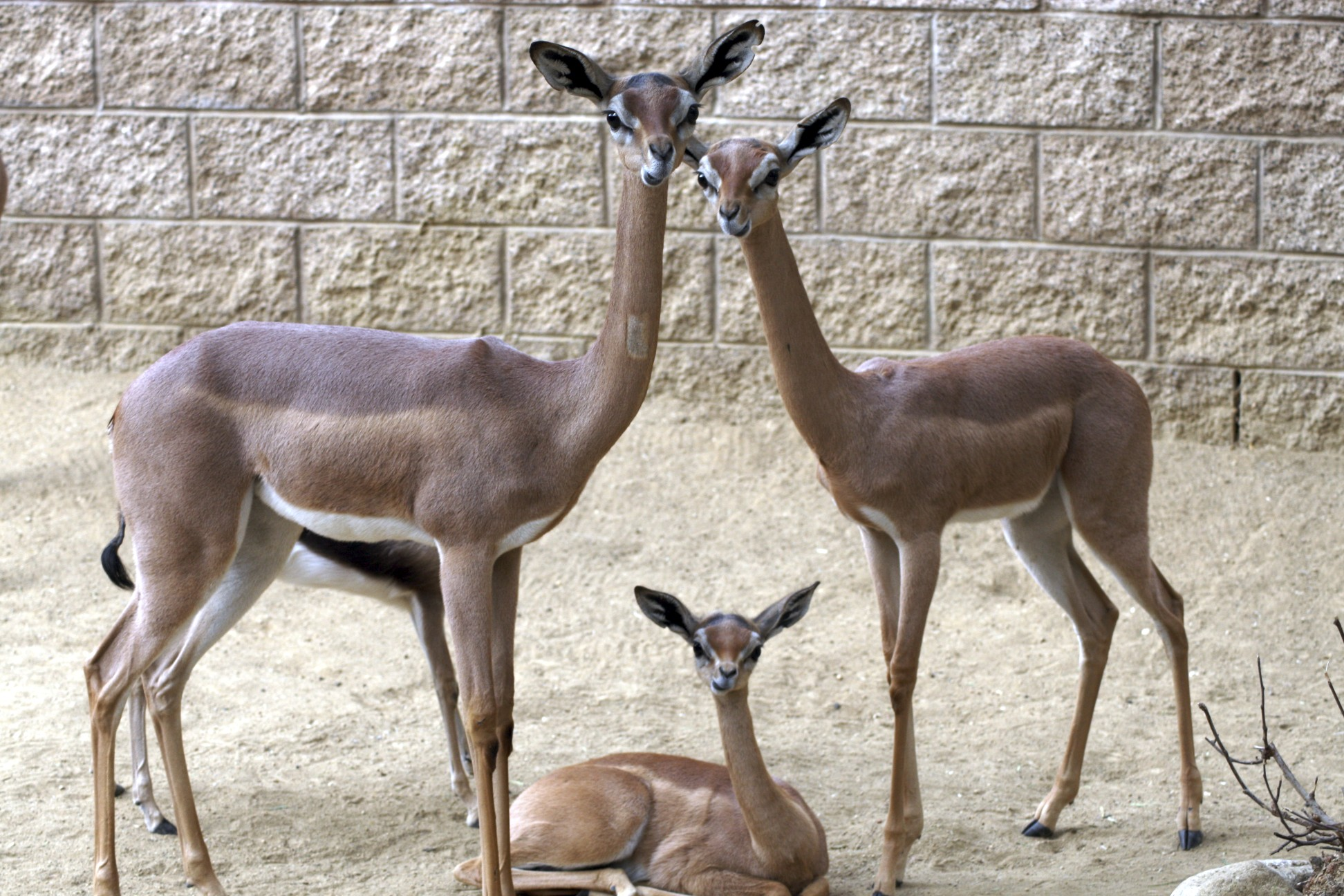 Gerenuk Family